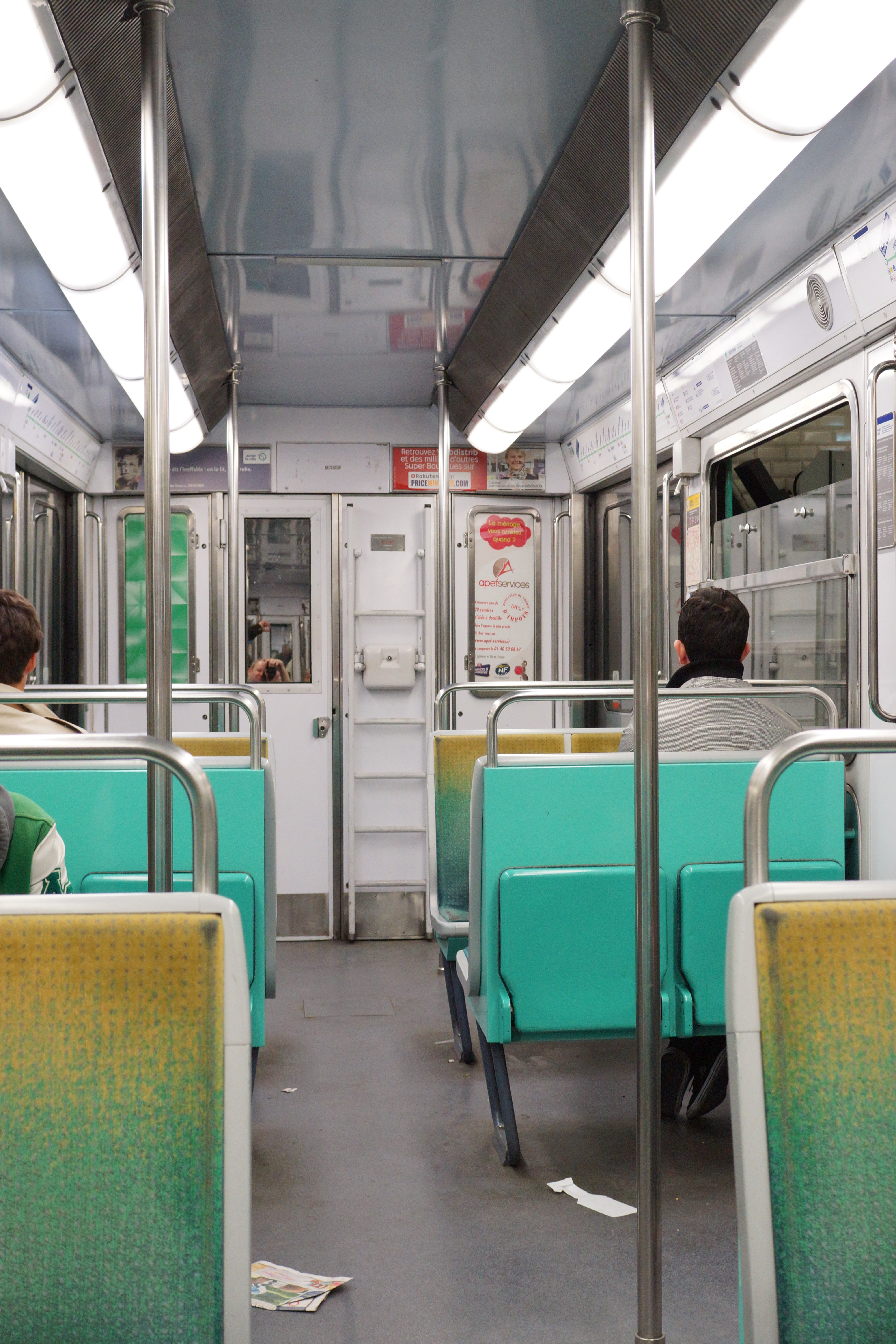 Sèvres - Lecourbe metro station, Paris.